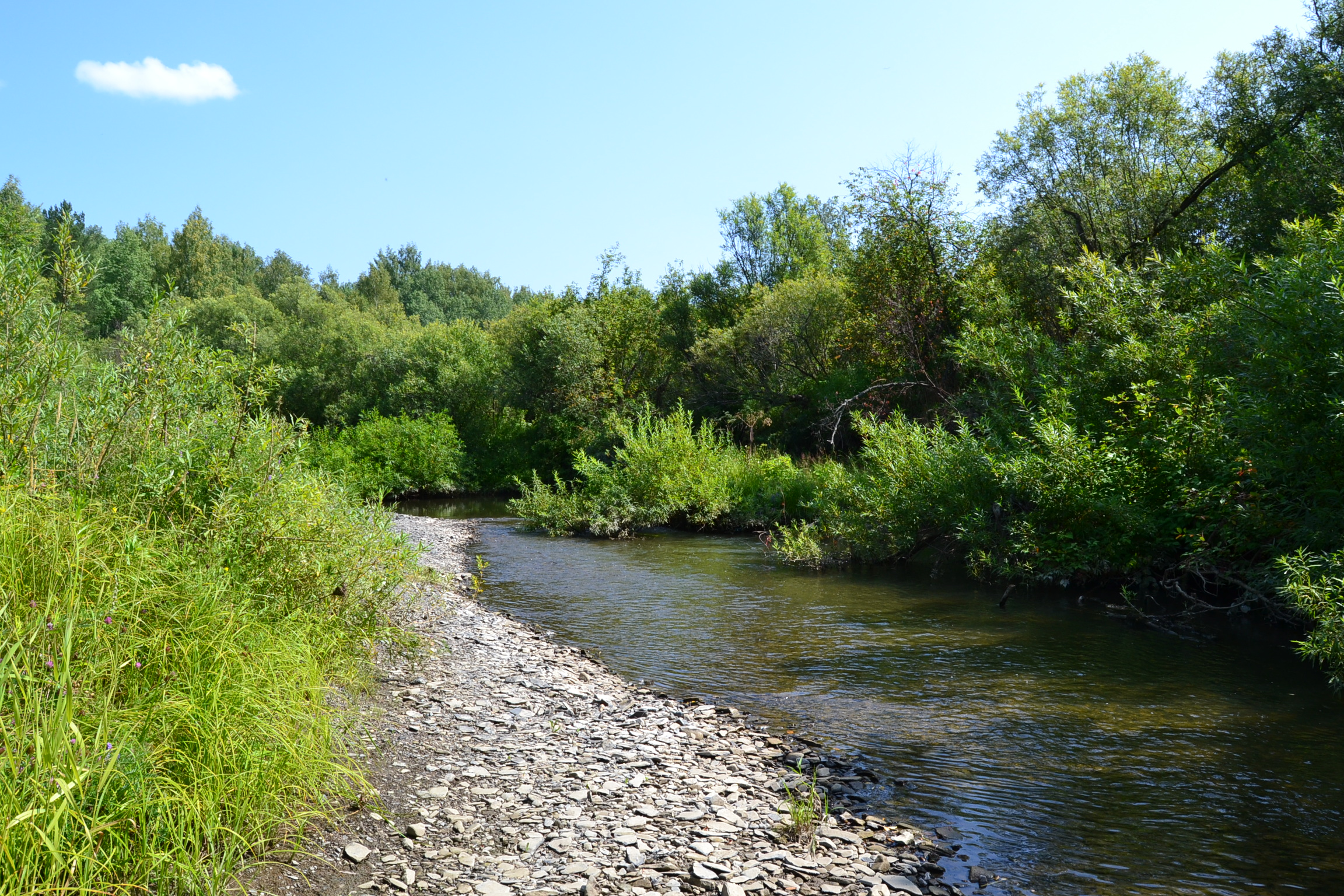 Река Басандайка в деревне Лучаново, Томский район